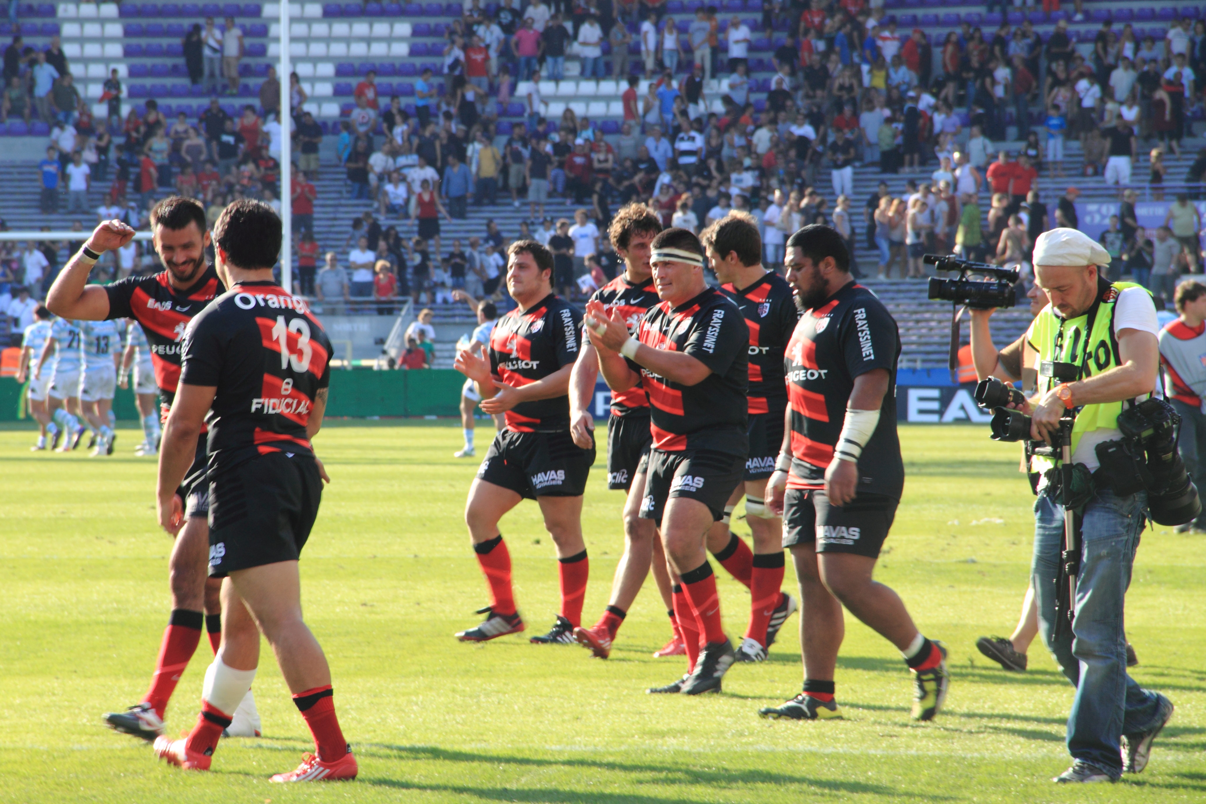 Stade toulousain Stadium de Toulouse lors de la rencontre Stade toulousain vs Racing métro 92 du 10 septembre 2011 comptant pour la troisième journée de top 14 2011-2012